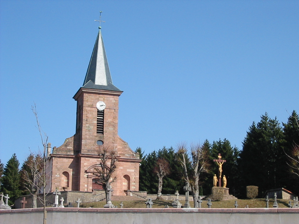 Saint-Michel-sur-Meurthe Commune des Vosges L'église Saint-Michel Photographie personnelle, prise le 19 mars 2006 Copyright © Christian Amet